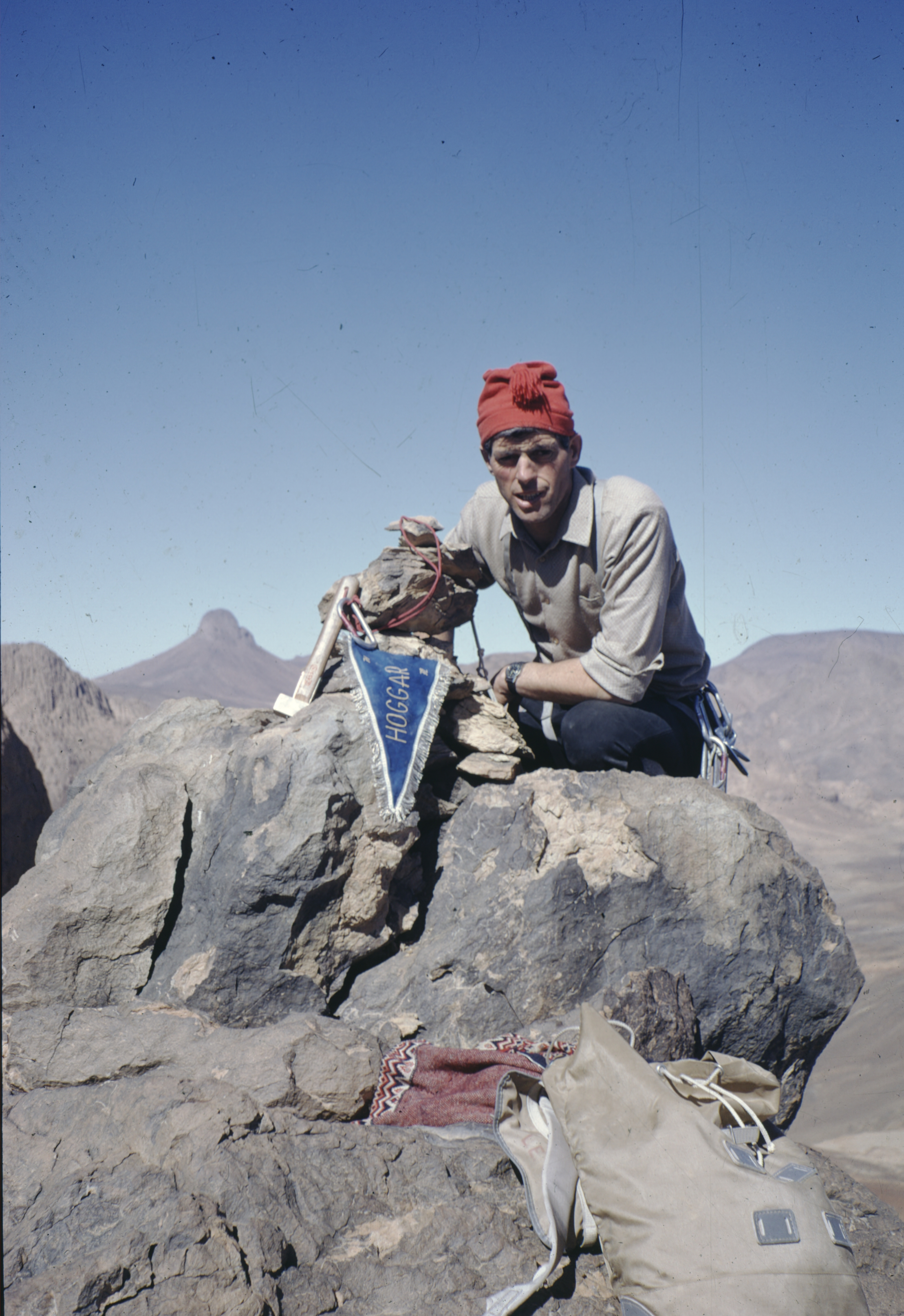 Sahara Algerino, Hoggar.